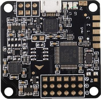 Le centre de commande du drone